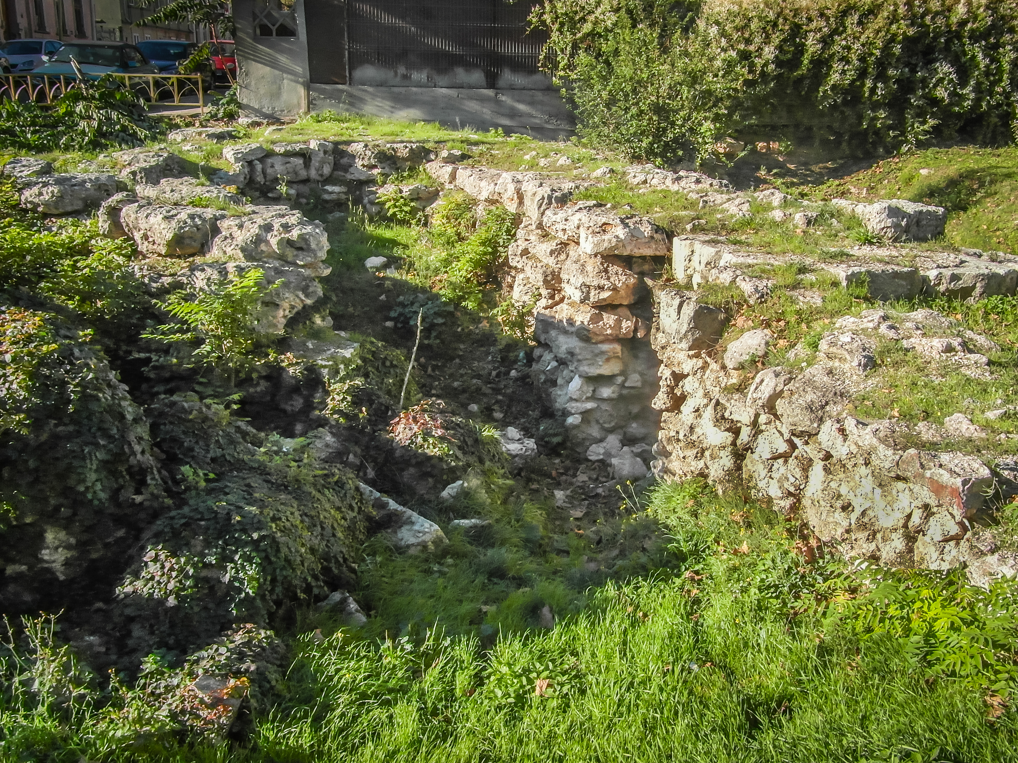 Amfiteatrul este localizat in zona hotelului IBIS din Constanta, in perimetrul str. Mircea cel Batran, Ecaterina Varga, Negru Voda, Dragos Voda. 06